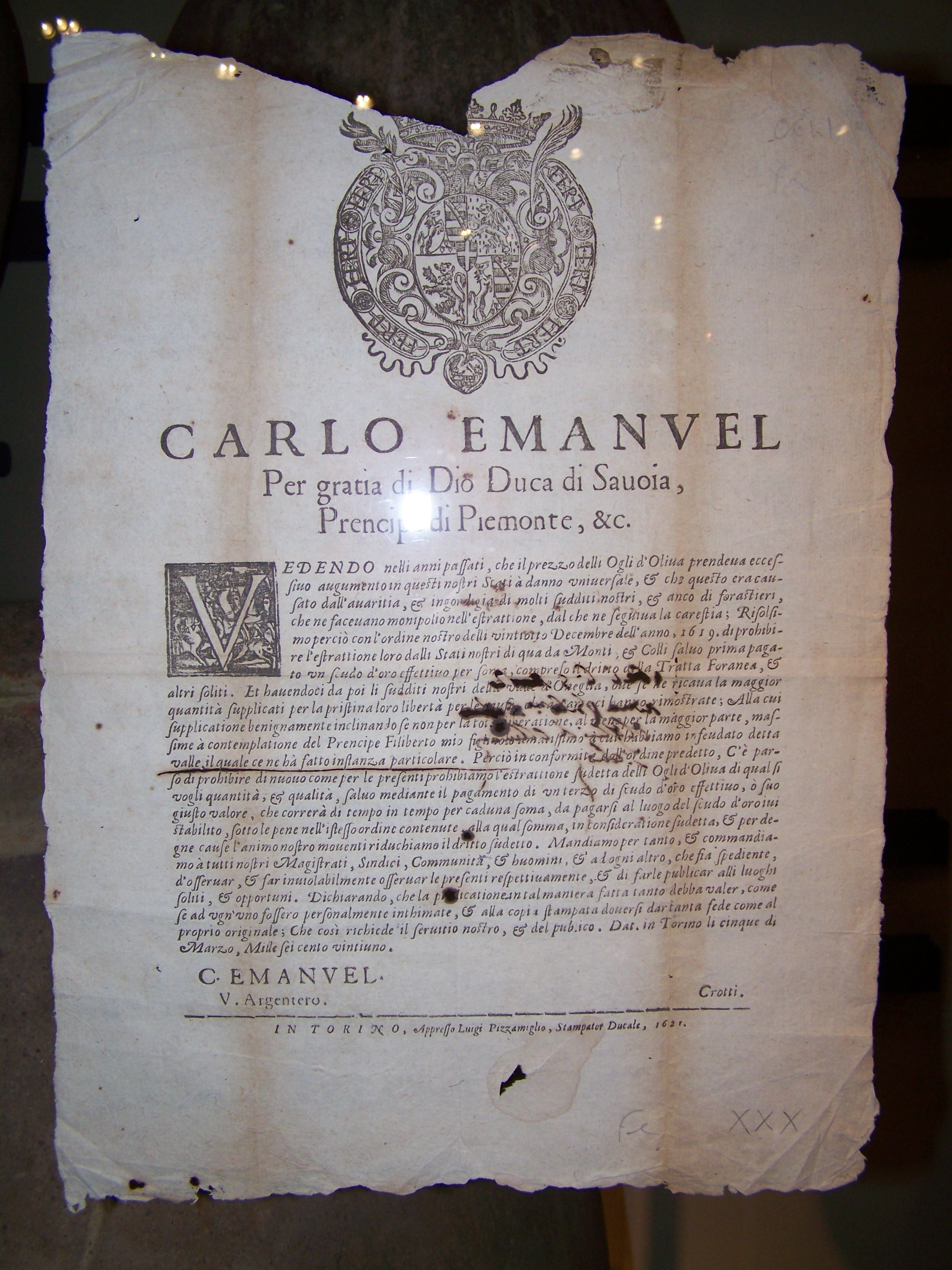 Edit du Duc de Savoie Charles-Emmanuel Ier (1562-1630) du 5 mars 1621 à Turin, réduisant l'impôt sur l'exportation de l'huile d'olive à la suite des suppliques des gens de la vallée d'Onéglia (Ligurie, Italie) et sur la requête de son fils Filibert leur feudataire.